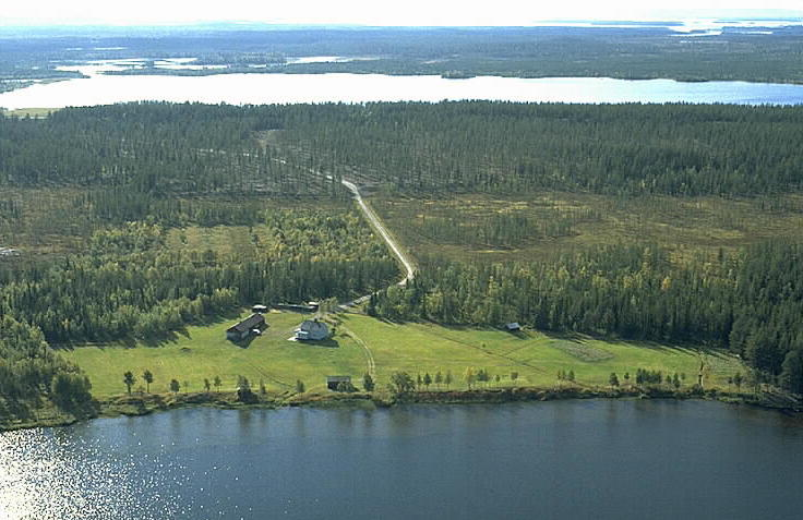 Motiv: Rackträsk-Dellaure Nyckelord: Flygbilder, Riksintressen Kategori: Insjömiljöer Rackträsk-Dellaure